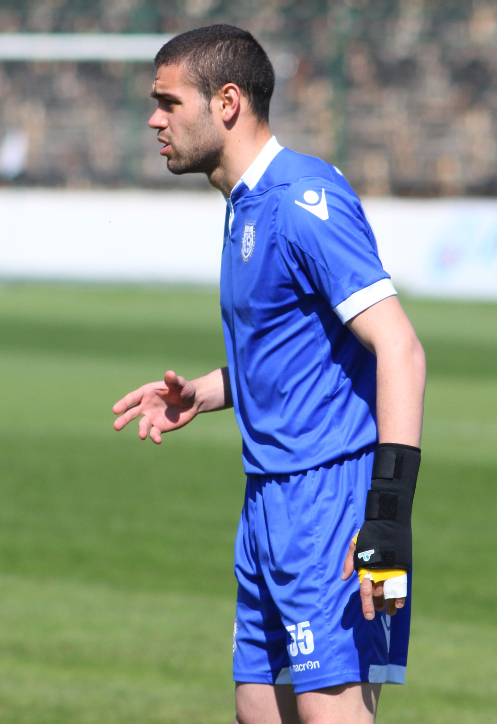 Георги Терзиев (роден на 18 април 1992 г. в Сливен, България) е български футболист, национал на България, който в момента играе за Черноморец (Бургас) като защитник.